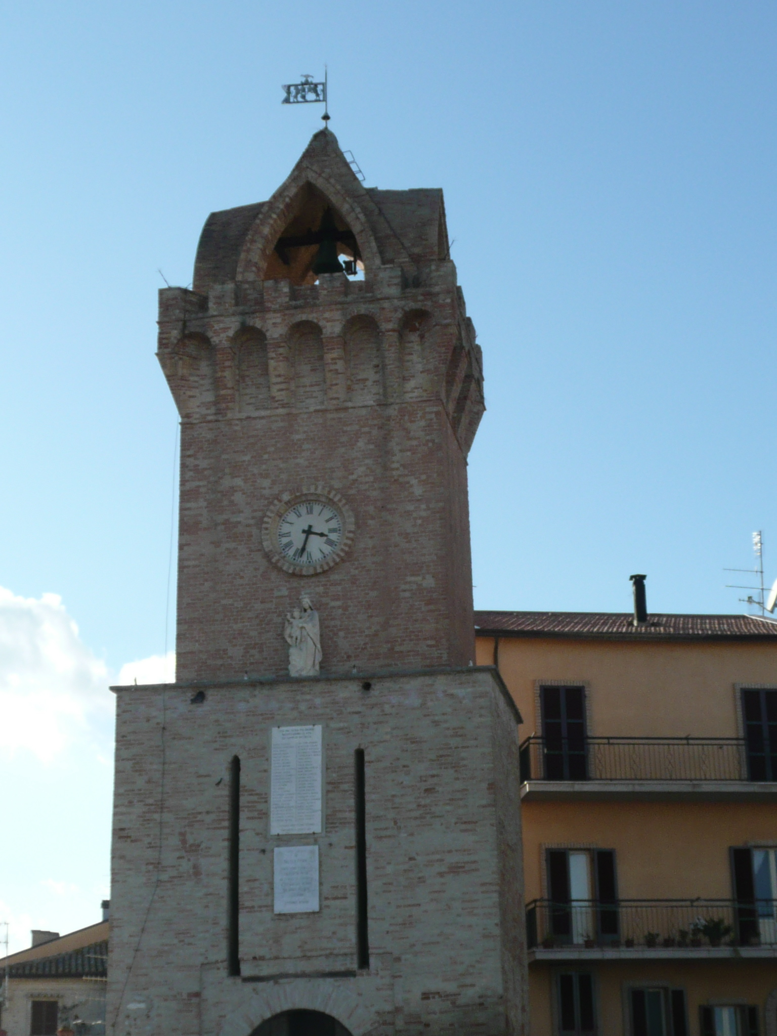 Foto della torre dell'orologio di Tortoreto Paese (Te) - Fonte